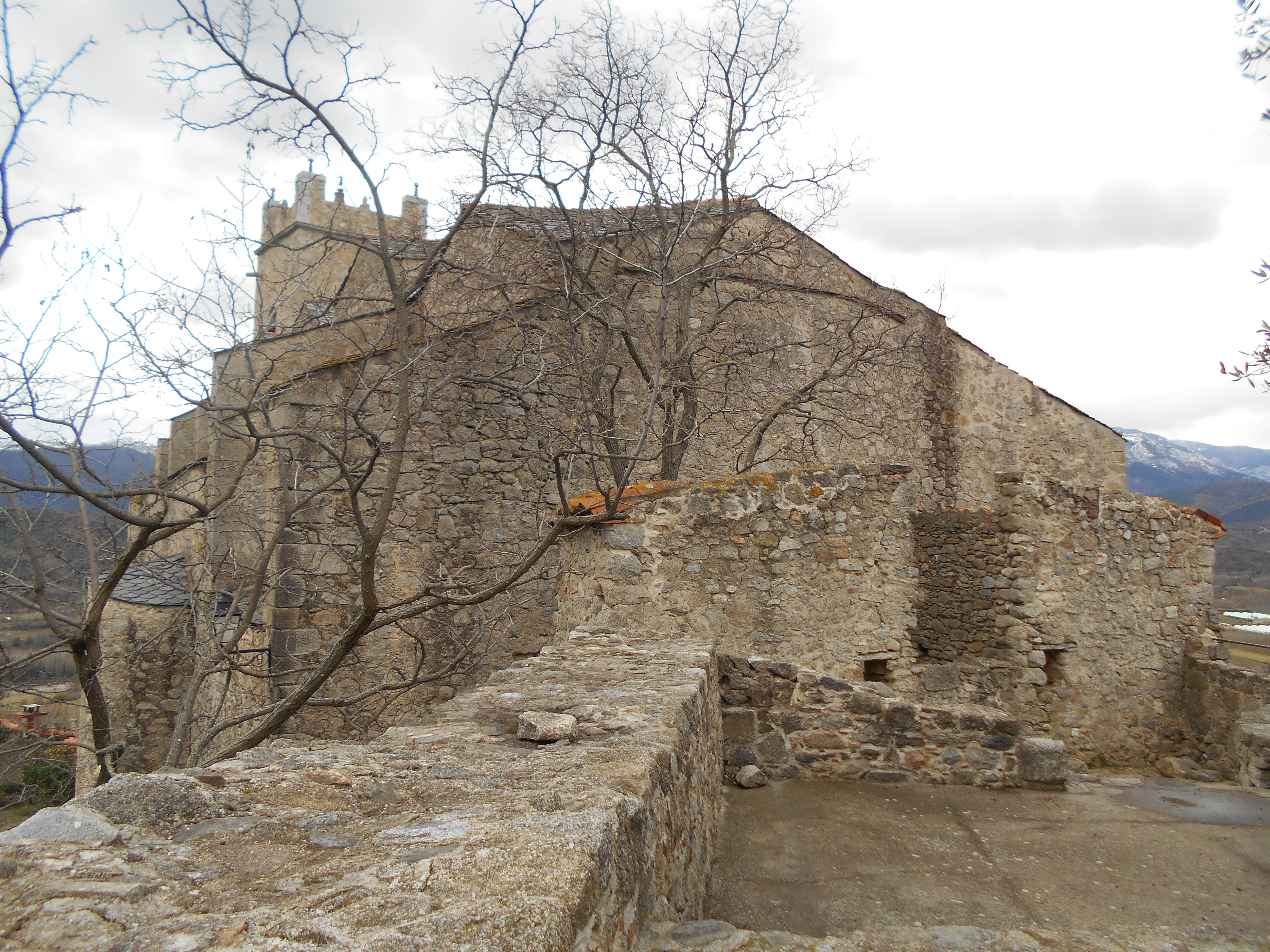 Capçalera de Sant Vicenç d'Eus, església nova.